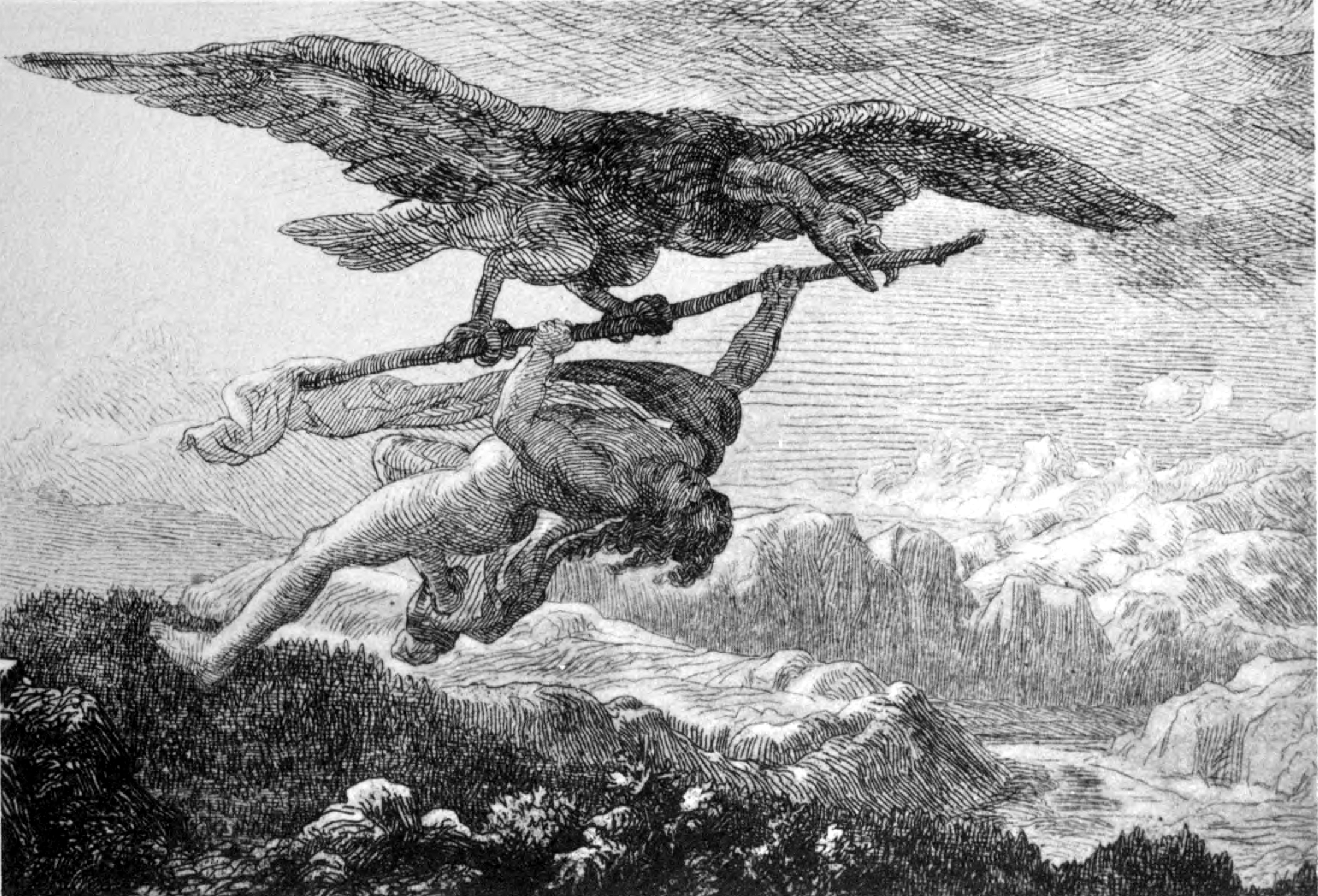 Þjazi carries Loki away.